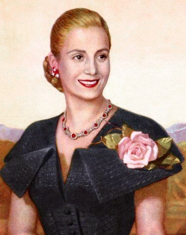 La Primera Dama de la Nación Argentina, María Eva Duarte de Perón, retratada en 1948. Archivo General de la Nación